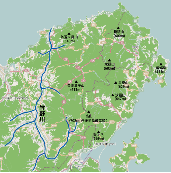 京都府北部の丹後半島にある主要な山と竹野川の位置図 This map may be incomplete, and may contain errors. Don't rely solely on it for navigation.